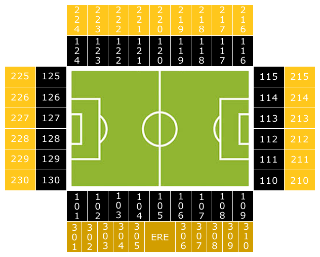 Gelredome stadium